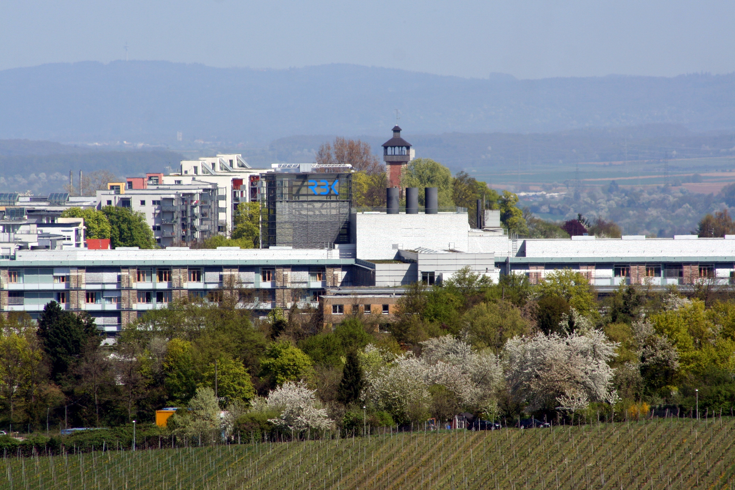 Robert-Bosch-Krankenhaus in Stuttgart-Burgholzhof